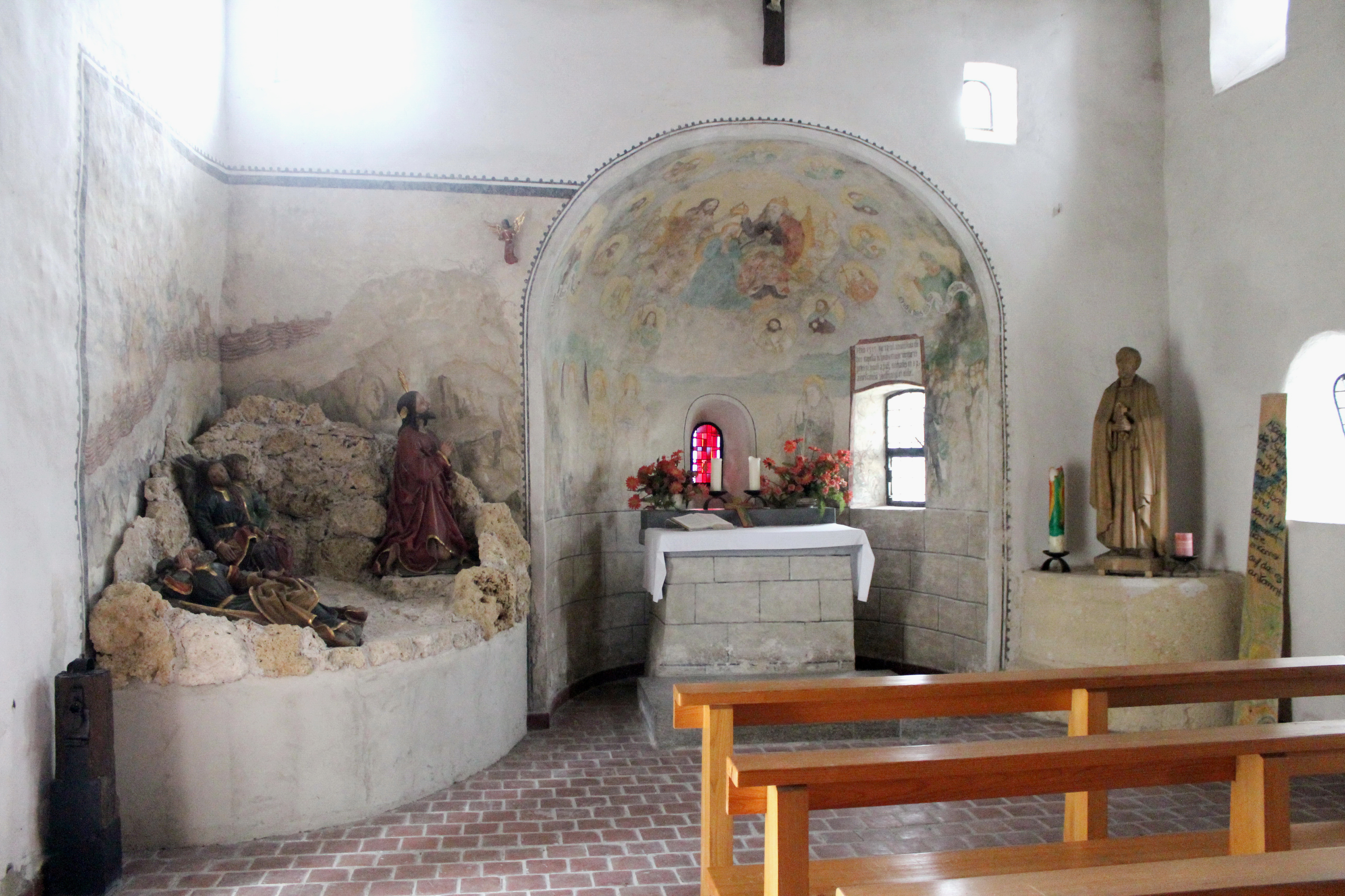 Weithin sichtbar über dem alten Stadtkern auf der Südseite der Burg Veringen in Veringenstadt steht eine romanische Kapelle. Sie ist den Heiligen Petrus und Paulus geweiht, wird aber von alters her allgemein Peterskapelle oder im Volksmund Peterskirchle genannt. Die Erbauung geht in das 10. oder 11. Jahrhundert zurück.